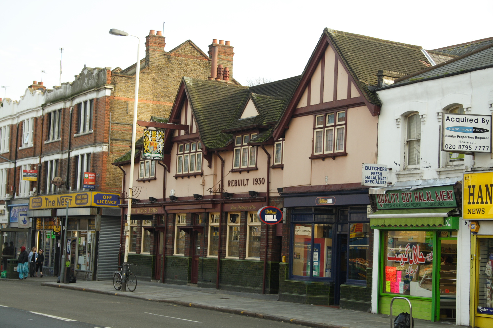 Kings Arms Hanwell